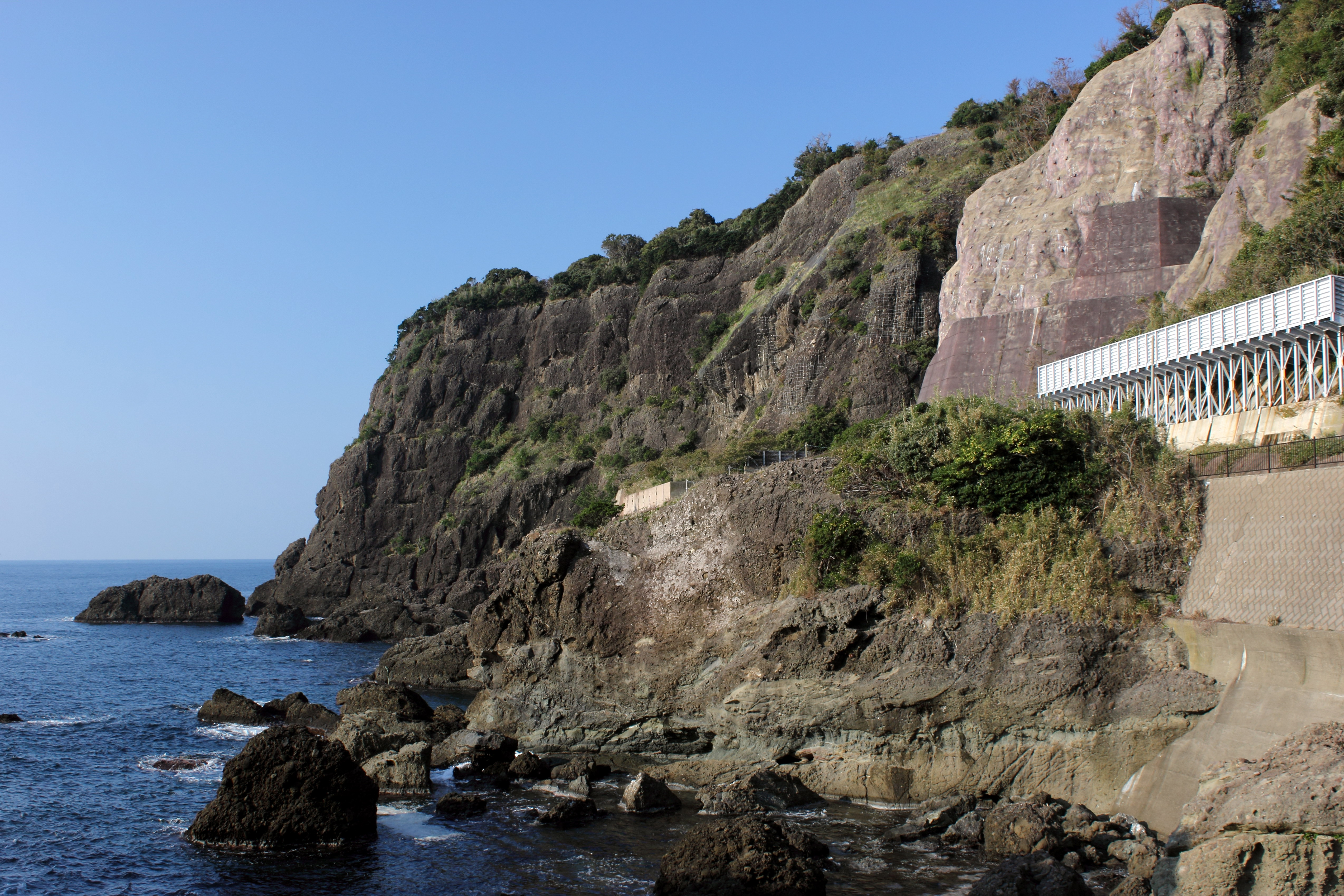 越前岬の近景